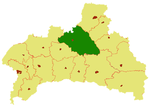 Ivacevický rajón v rámci Brestské oblasti